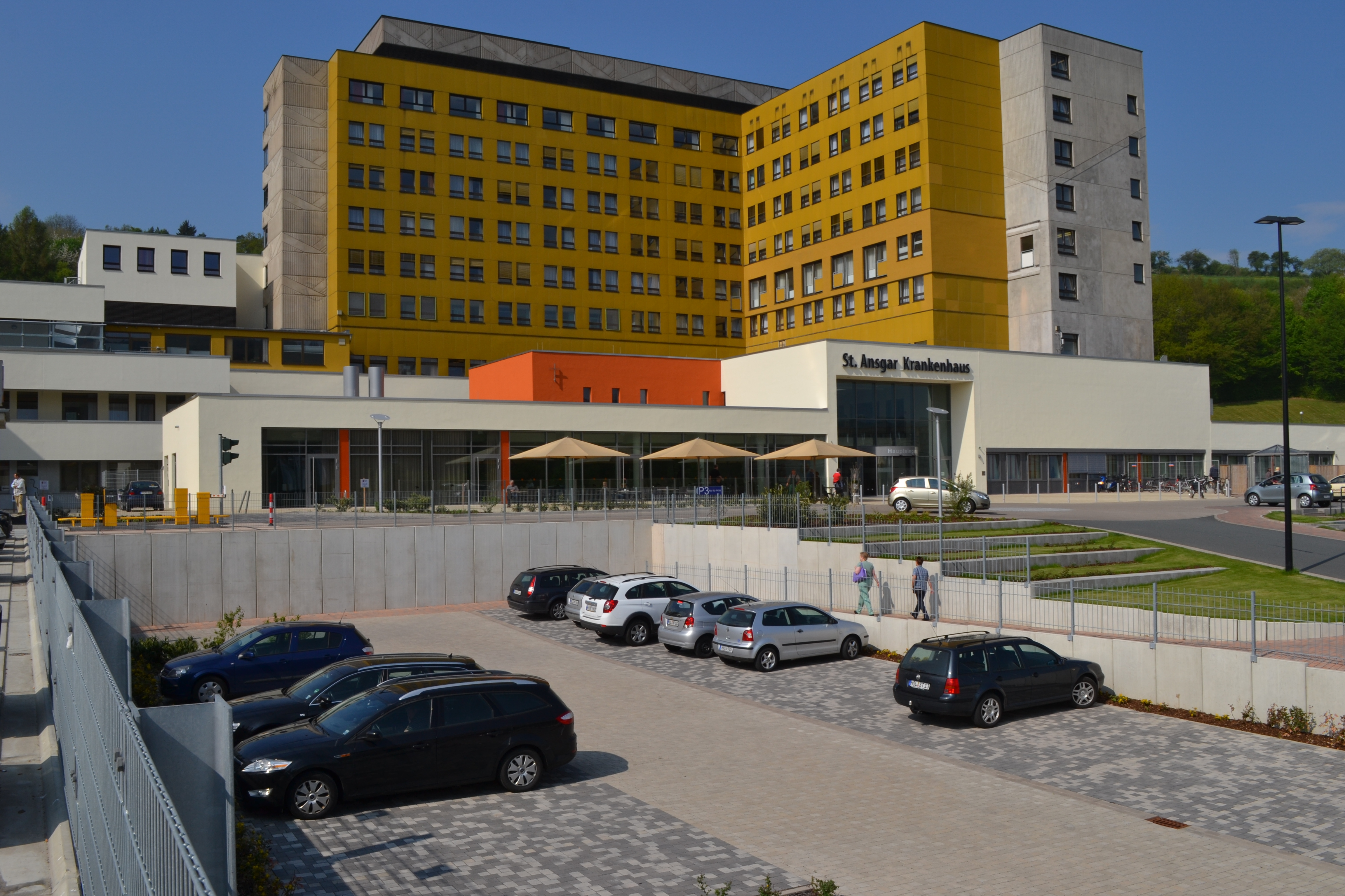 St. Ansgar Hospital 2017